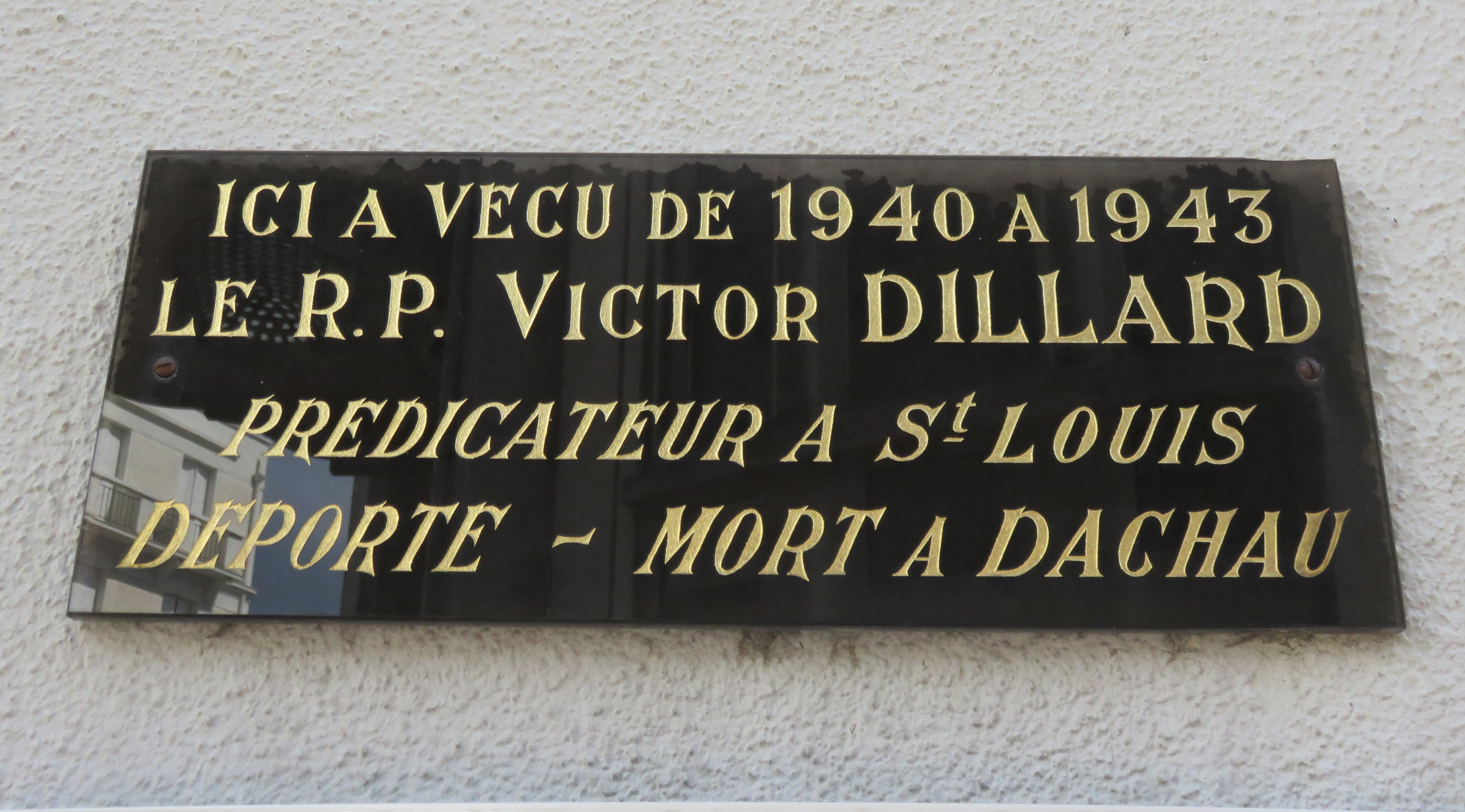 Plaque commémorant Victor Dillard, ayant vécu à cette adresse (rue de l'Église) entre 1940 et 1943, avant d'être déporté, à Vichy (Allier, France).